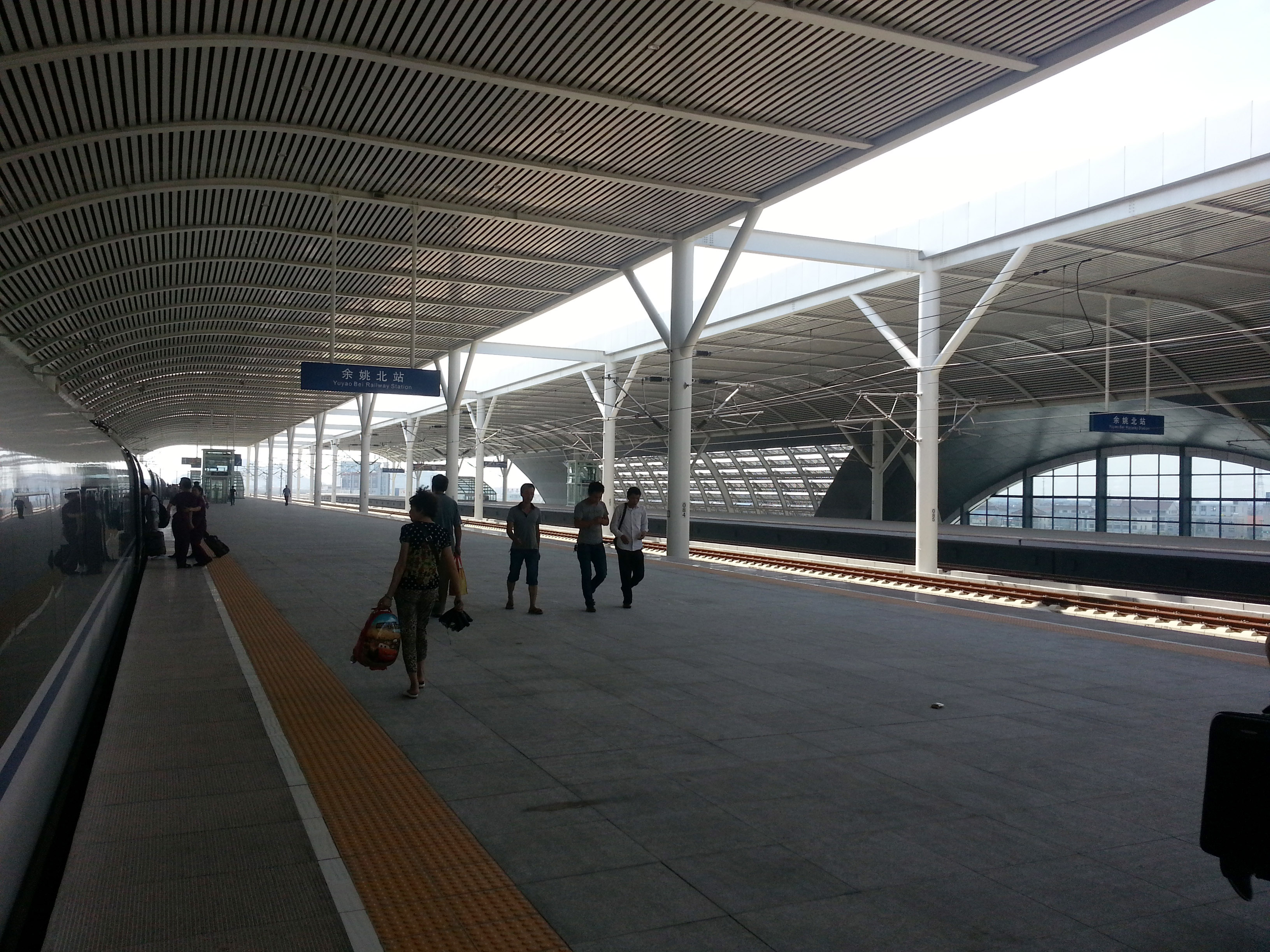 余姚北站站台